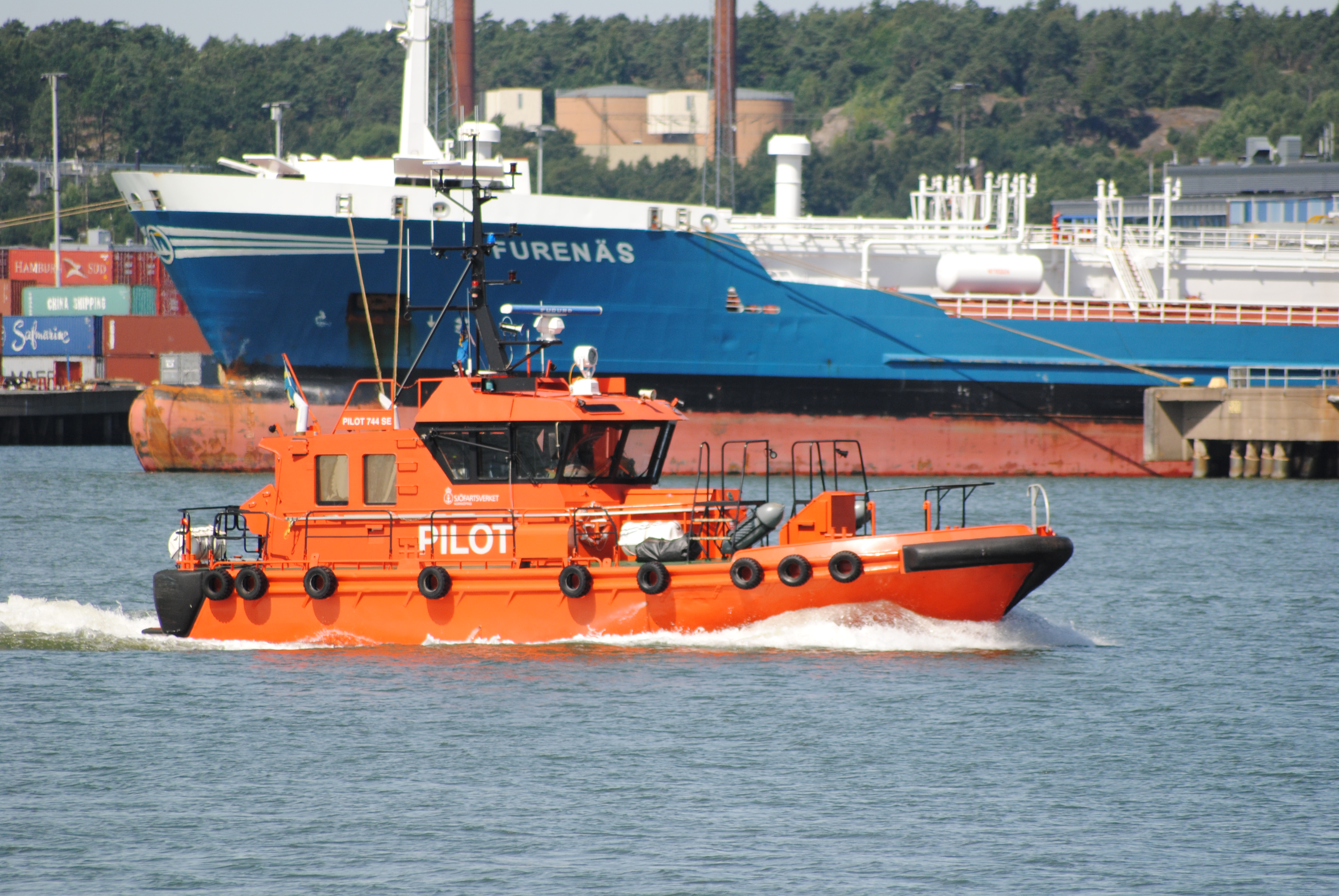 Pilot 744 passerar här Skandiahamnen